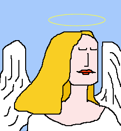 Angel with Halo מלאכית עם הילה